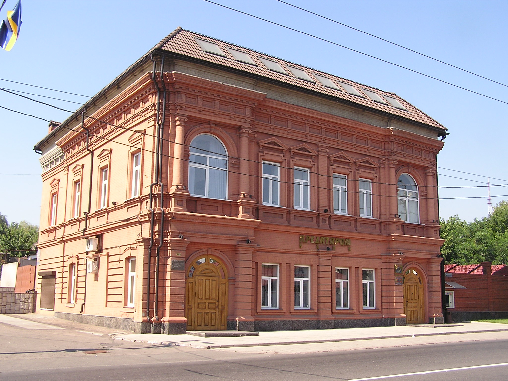 Школа детей английской администрации ЮМЗ